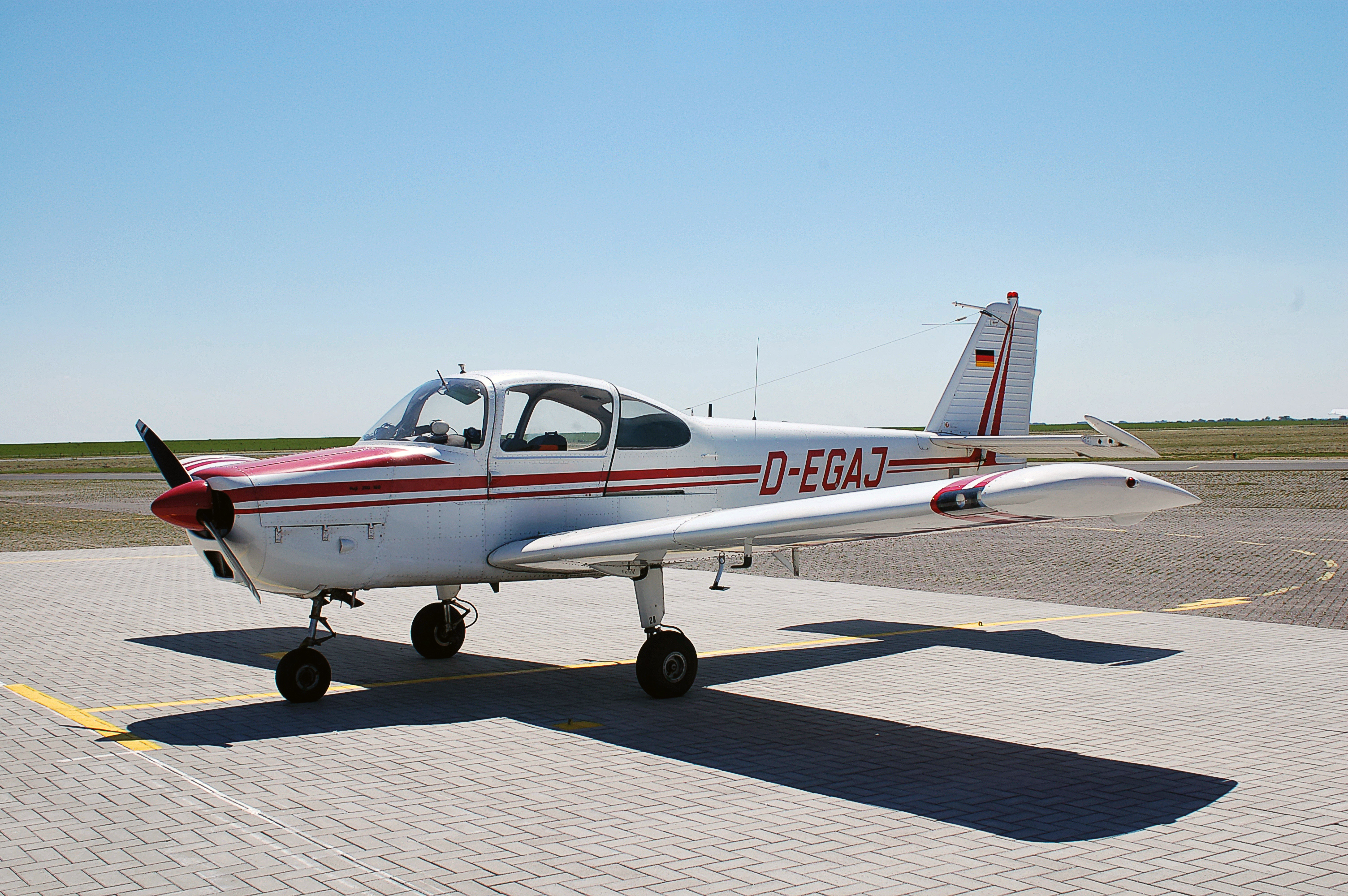 Luftbilder von der Nordseeküste 2012-05